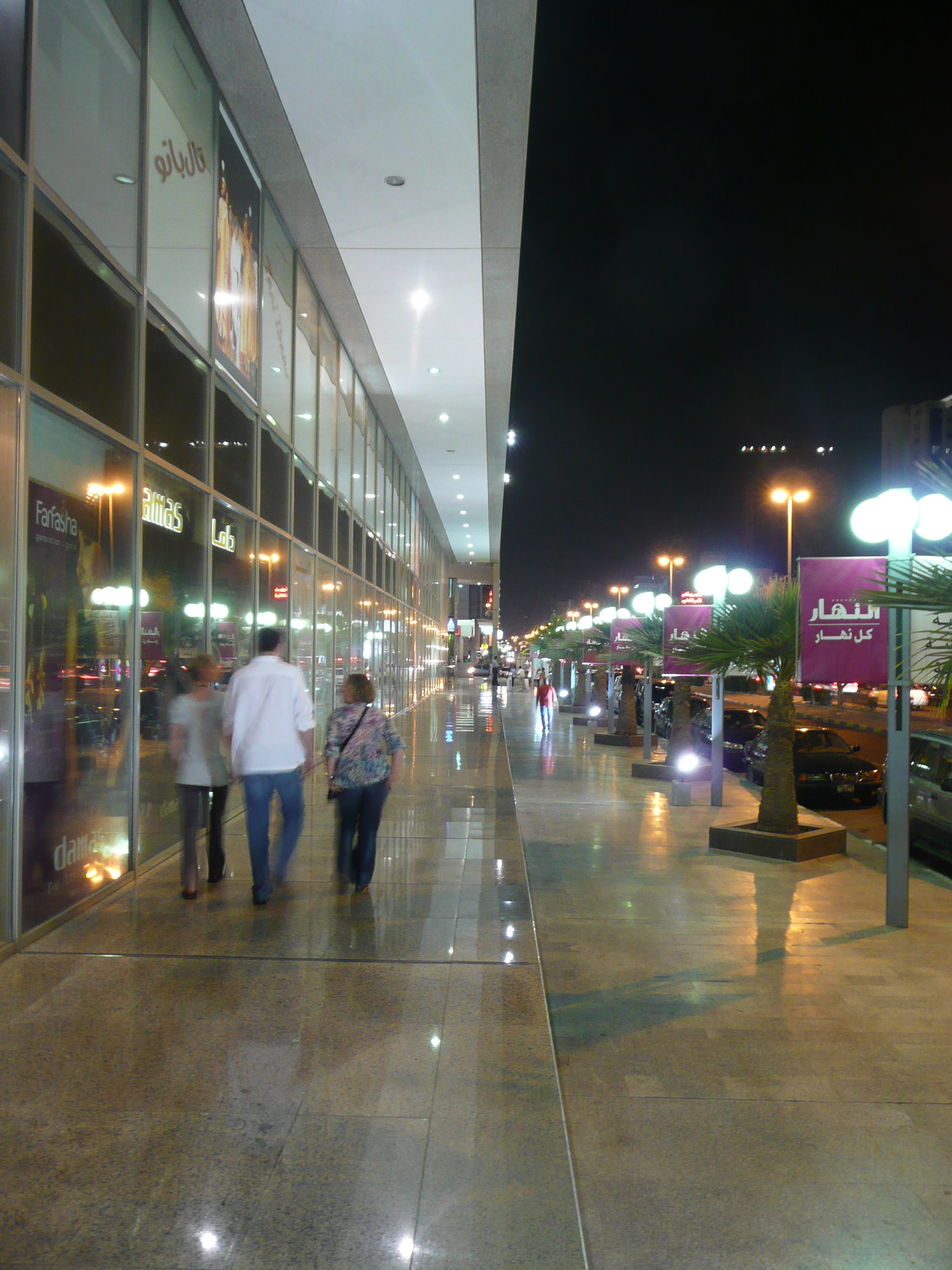 Street in Al-Salmiya, Kuwait